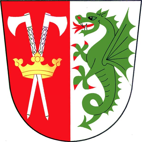 Znak obce Hošťka (okres Tachov)